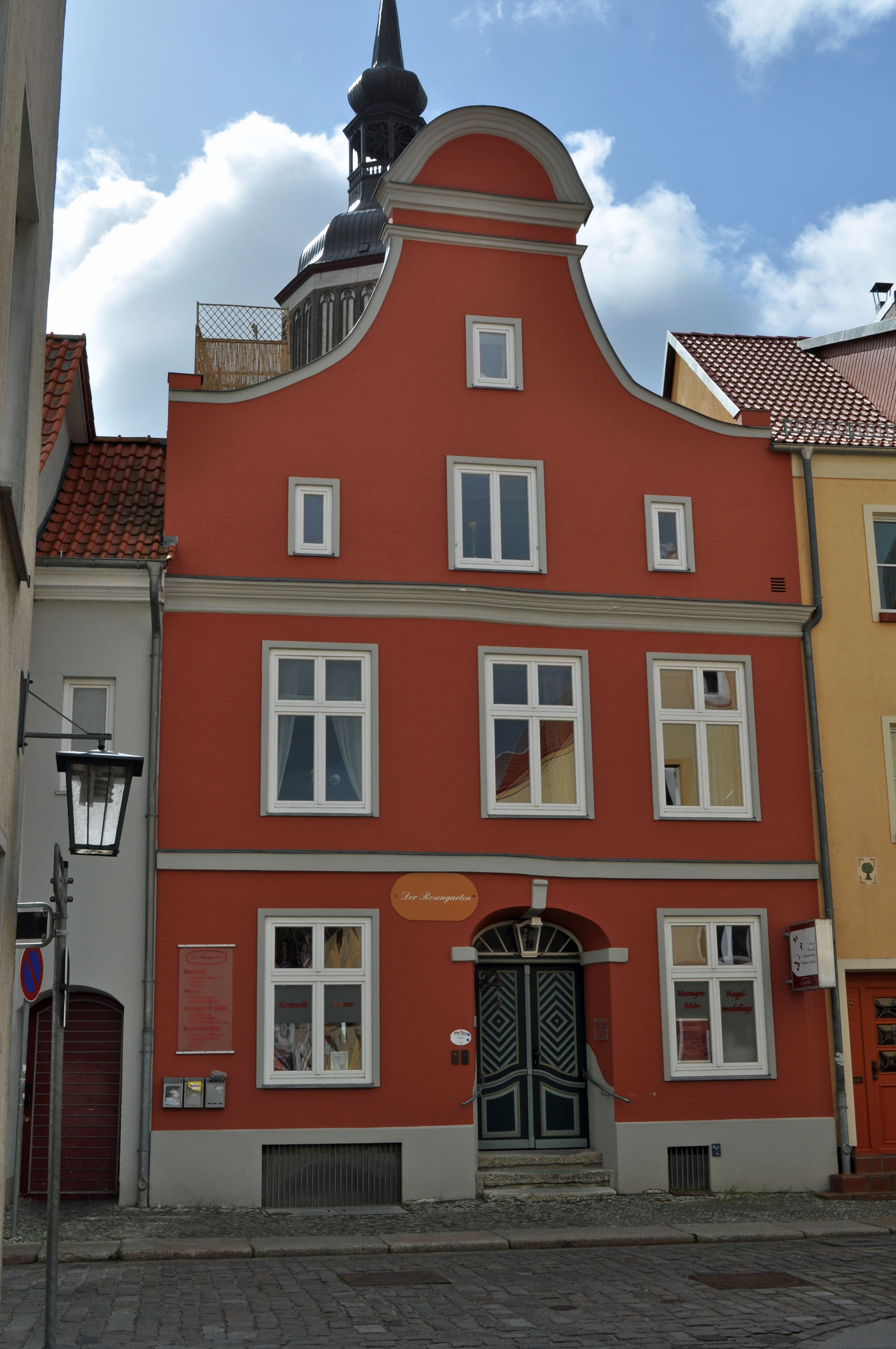 Gebäude in Stralsund, siehe Dateiname